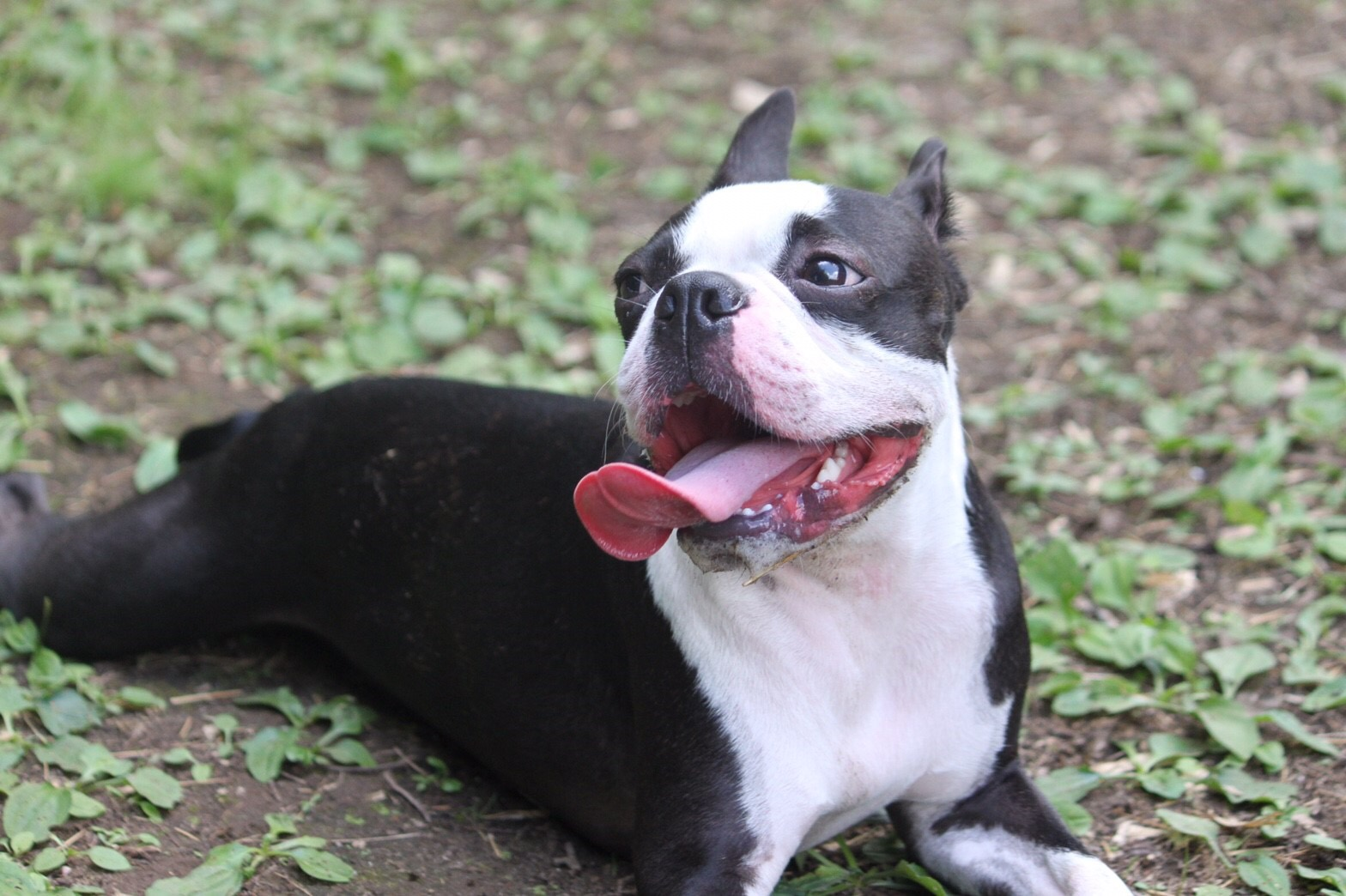 ボストンテリア